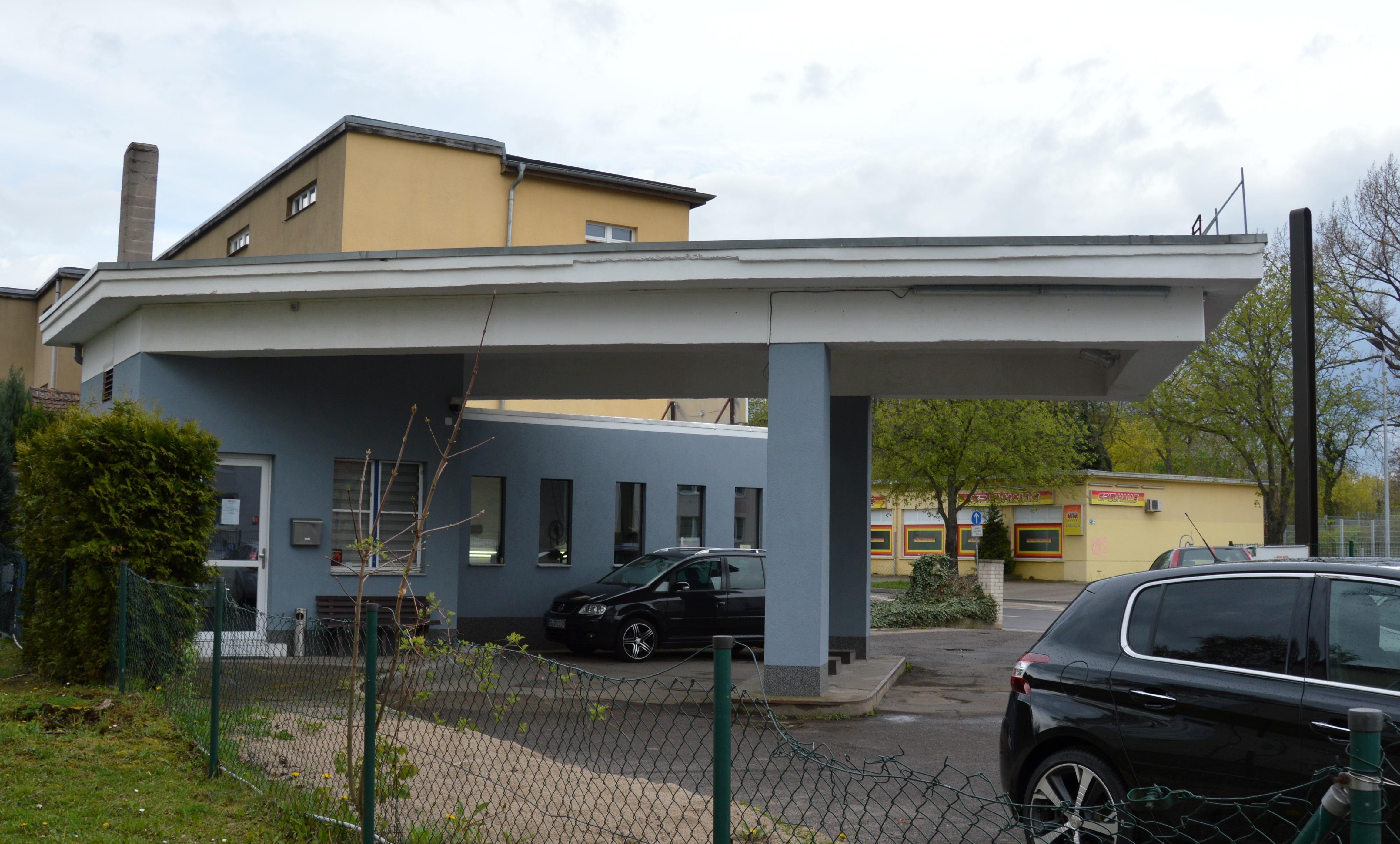 Tankstelle Kirchweg